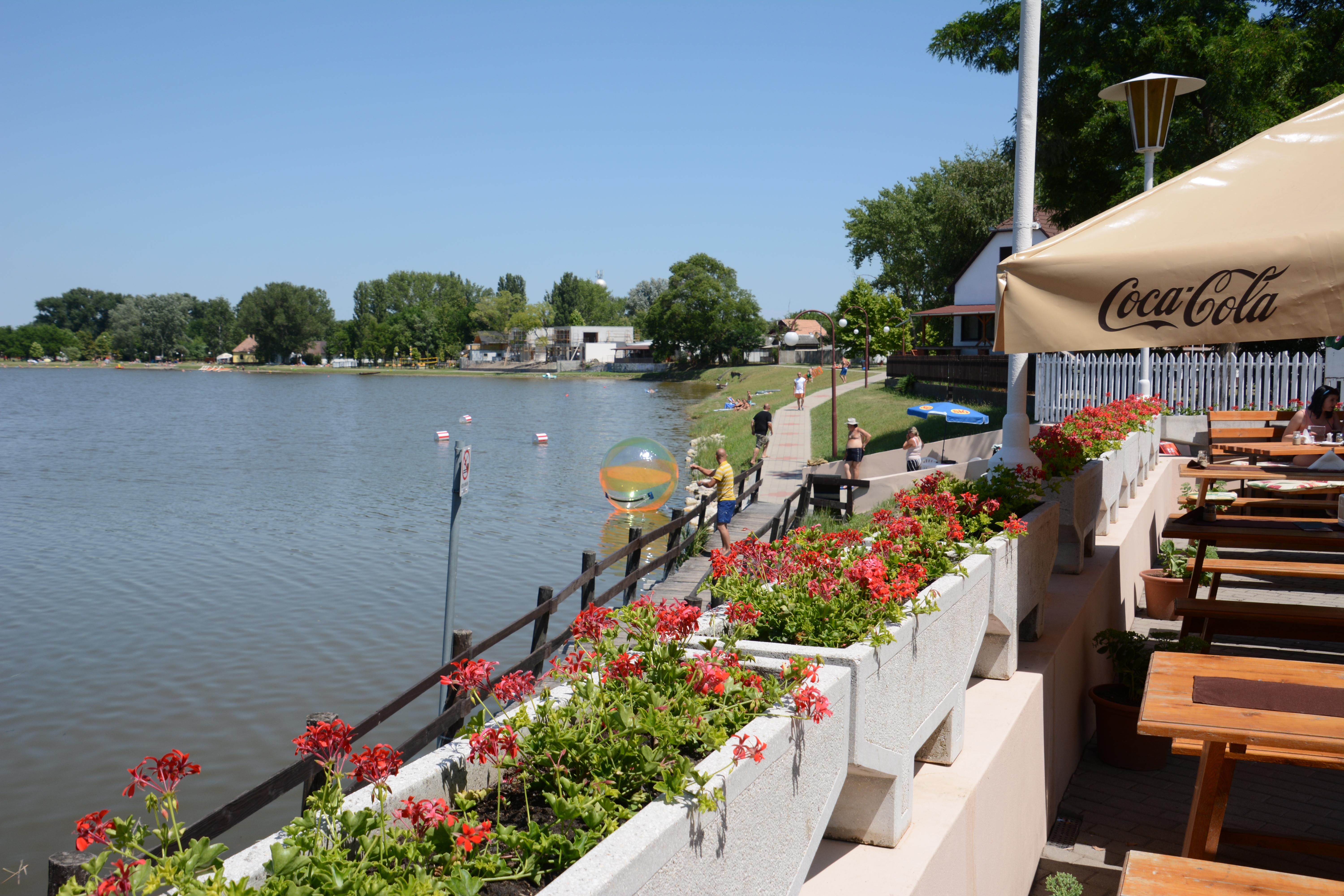 part-részlet, Szelid